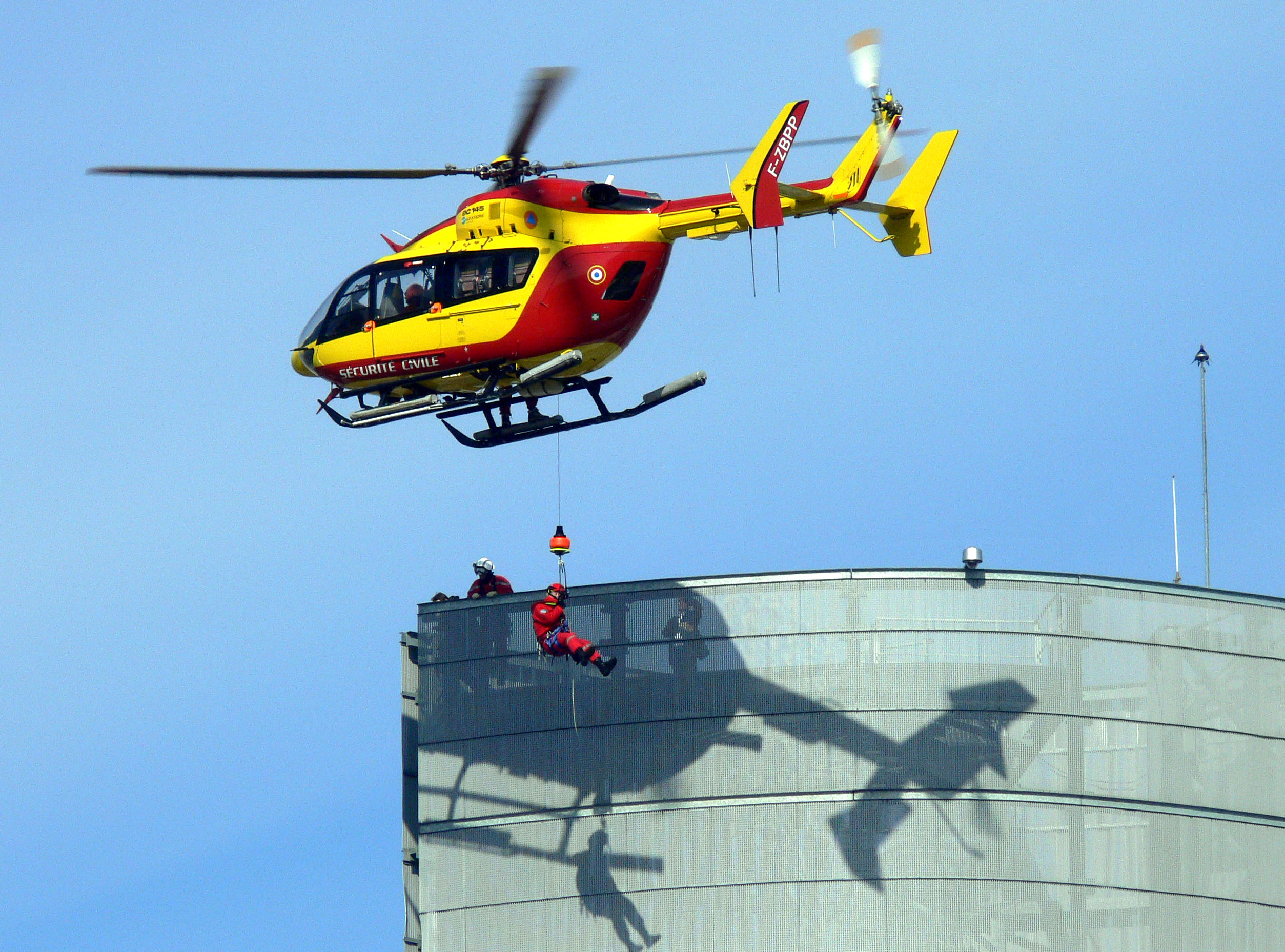 Exercice avec héliportage, par la sécurité civile (Lille, France)